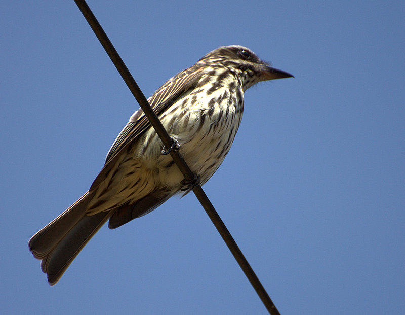 "Fazenda do Estado" localizada no município de Manduri-SP